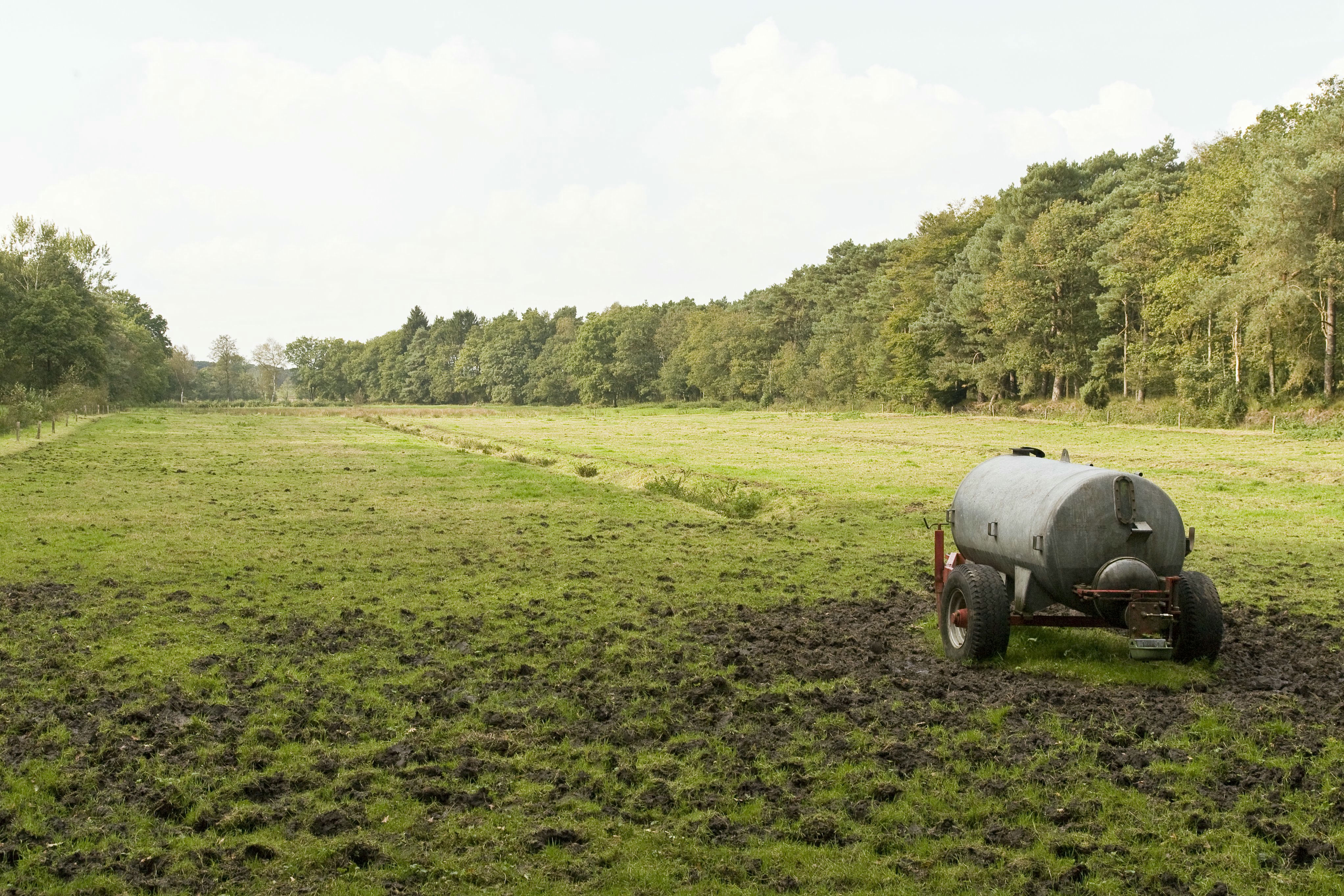 Weg van de Strengen: Zijdal van het Loonerdiep, bij Kampsheide met een giertank op de voorgrond (opmerking: Gemaakt voor publicatie landschapsbiografie Drentse Aa)